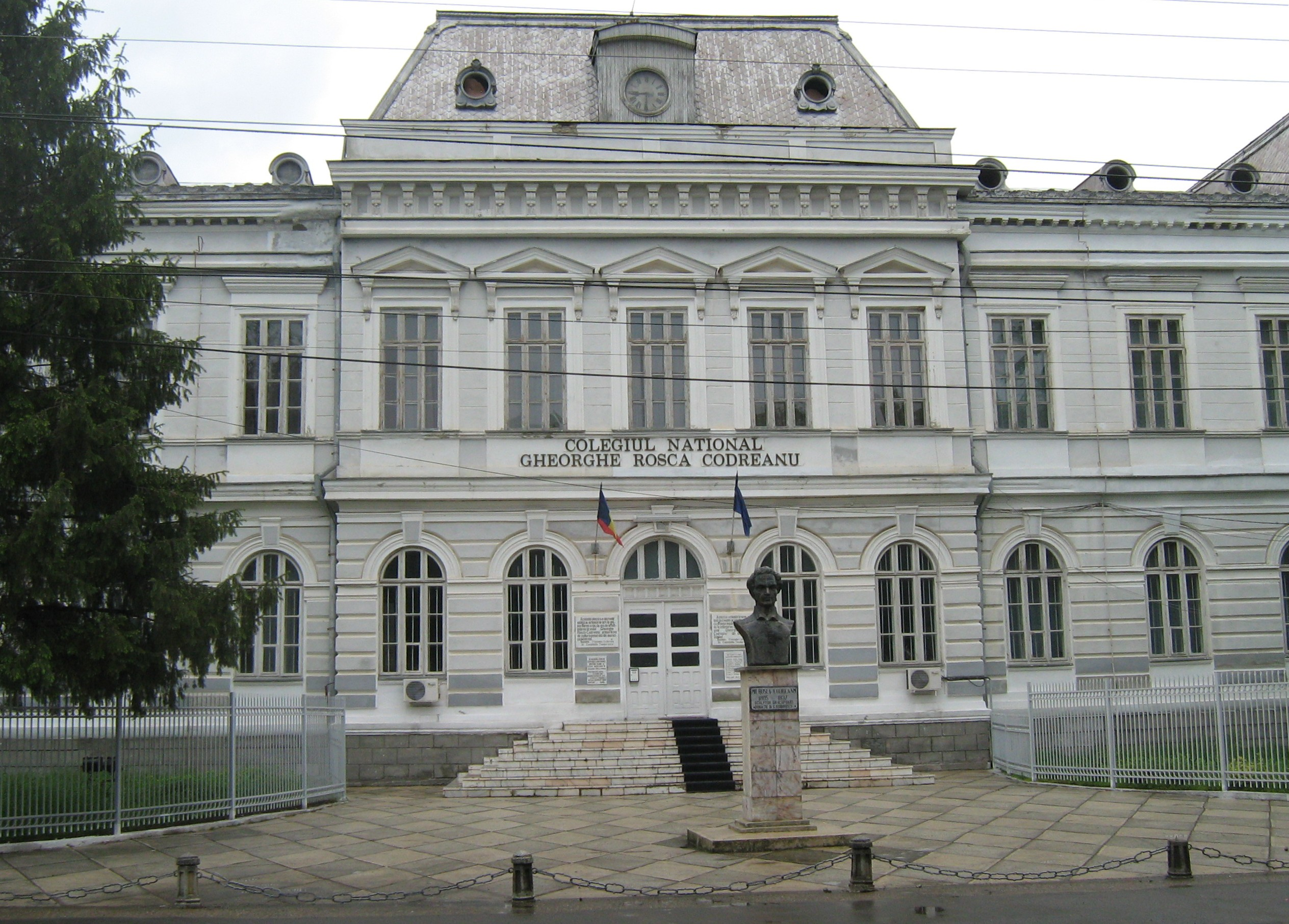 Liceul de Băieți "Gh. Roșca Codreanu", azi Colegiul Național "Gh. Roșca Codreanu"